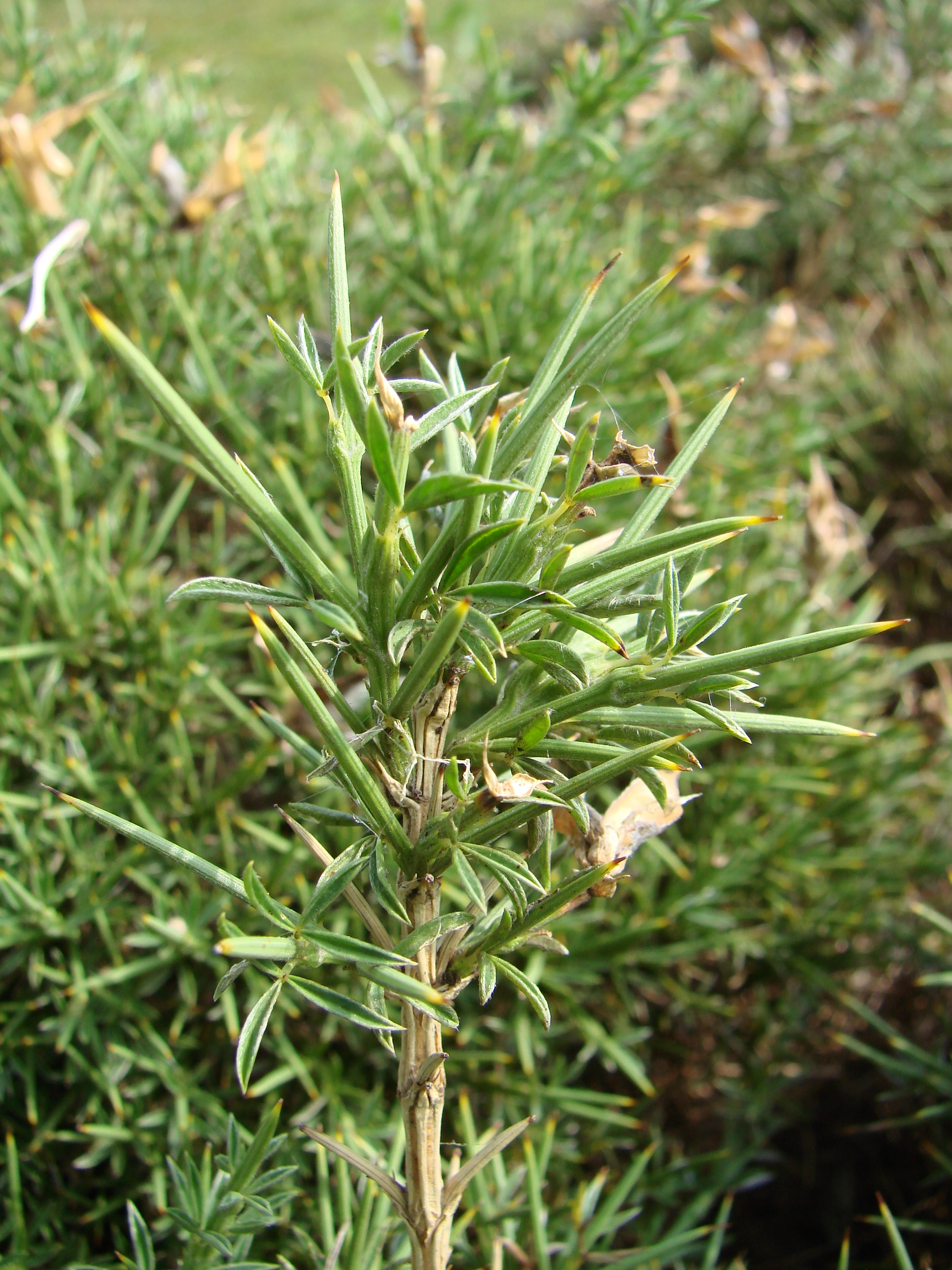 Echinospartum horridum (Vahl) Rothm. / Genista Horrida (Vahl) DC.